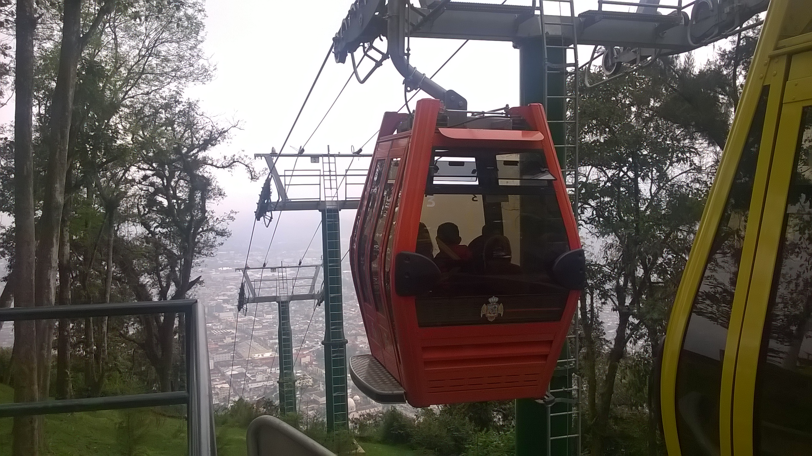 Teleférico ascendiendo al cerro del Borrego